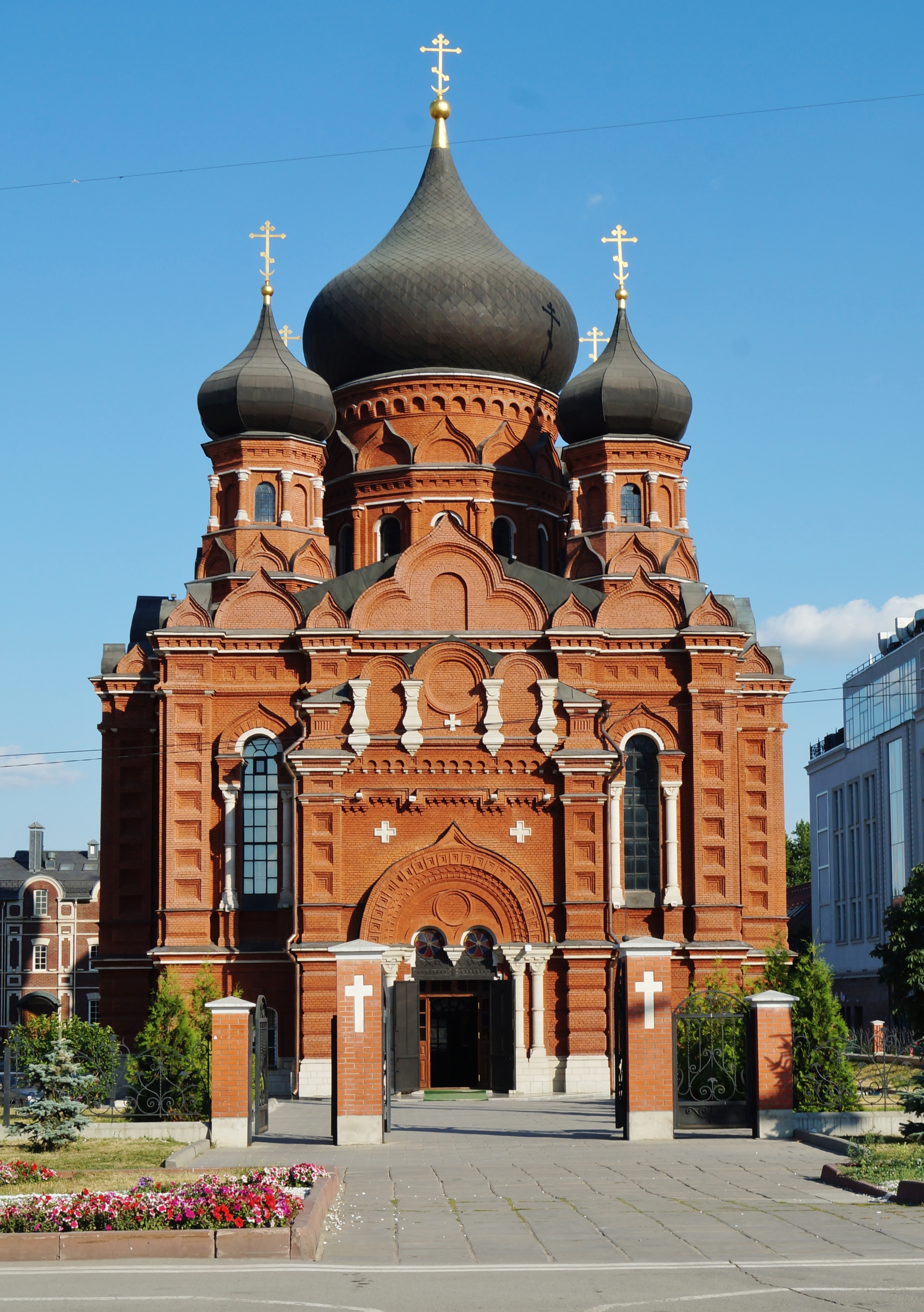 Cathedral of the Dormition at Uspensky Convent (Tula, Russia)